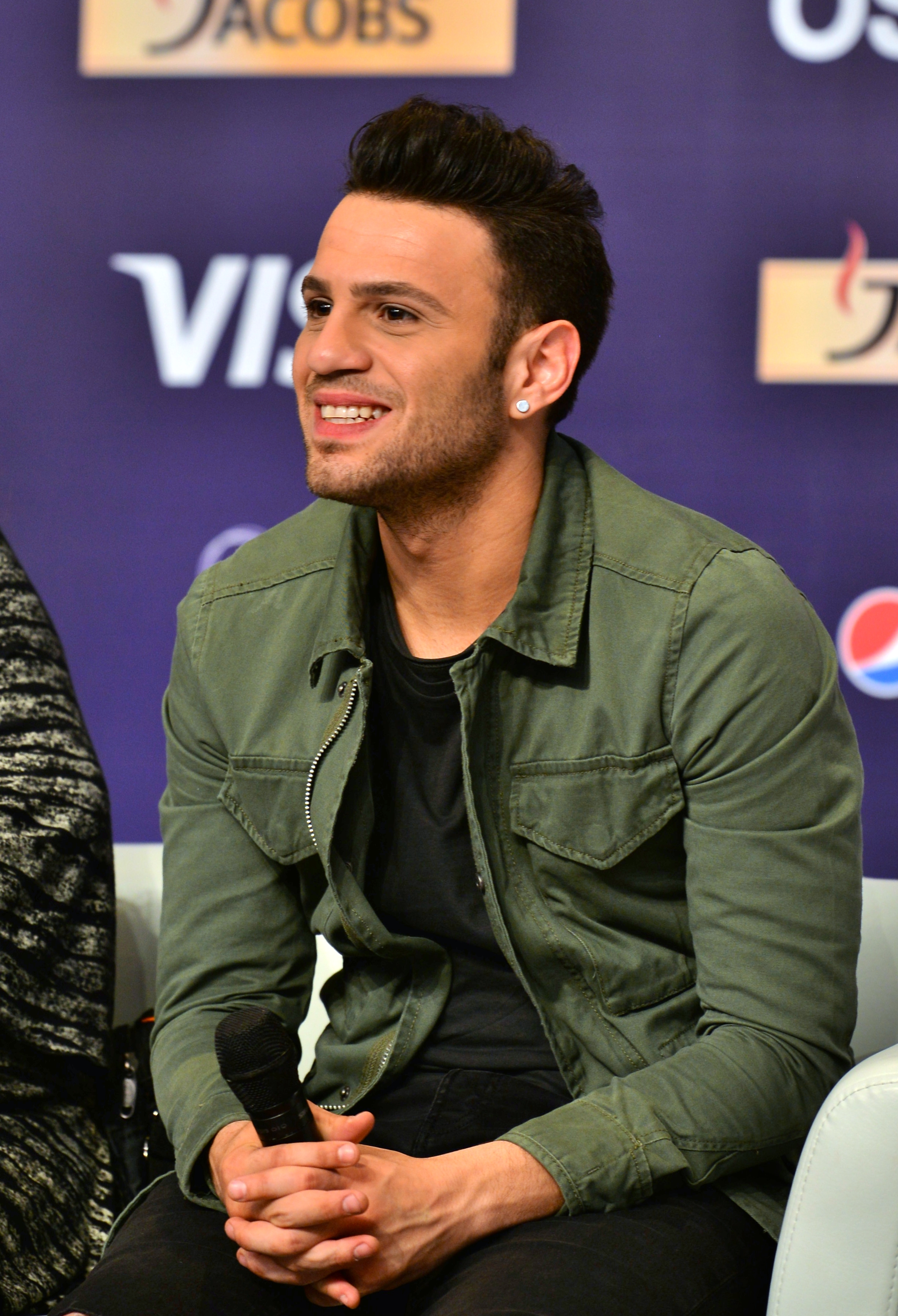 Кіпріотський співак вірменського походження Овіґ Демірчян на пісенному конкурсі Євробачення 2017 у Києві